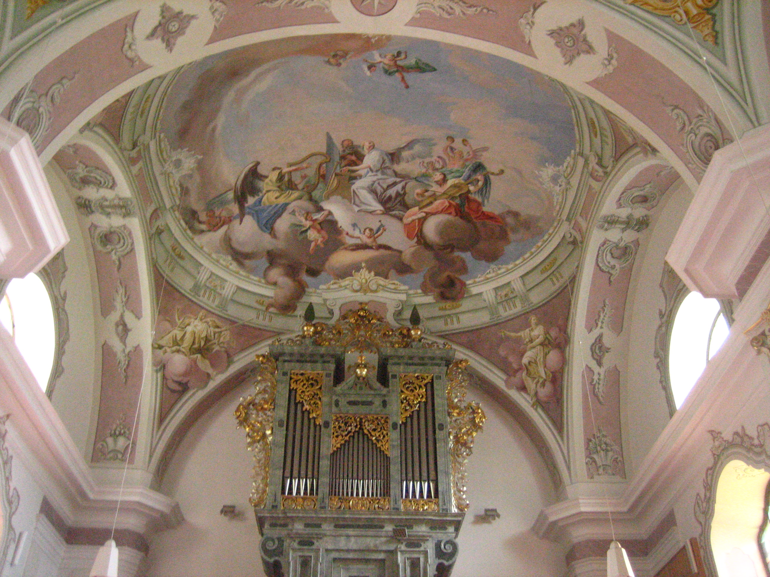 Lavant - Pfarrkirche Heiliger Ulrich (Deckenfresko)